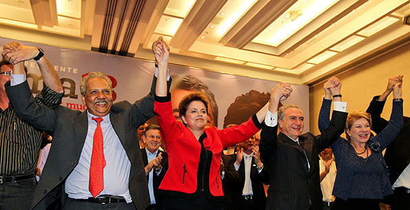 Campinas - SP. Encontro com Prefeitos e Lideranças Políticas da Região. Foto: Roberto Stuckert Filho.